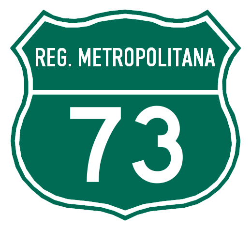 Escudo de la Ruta CH-73